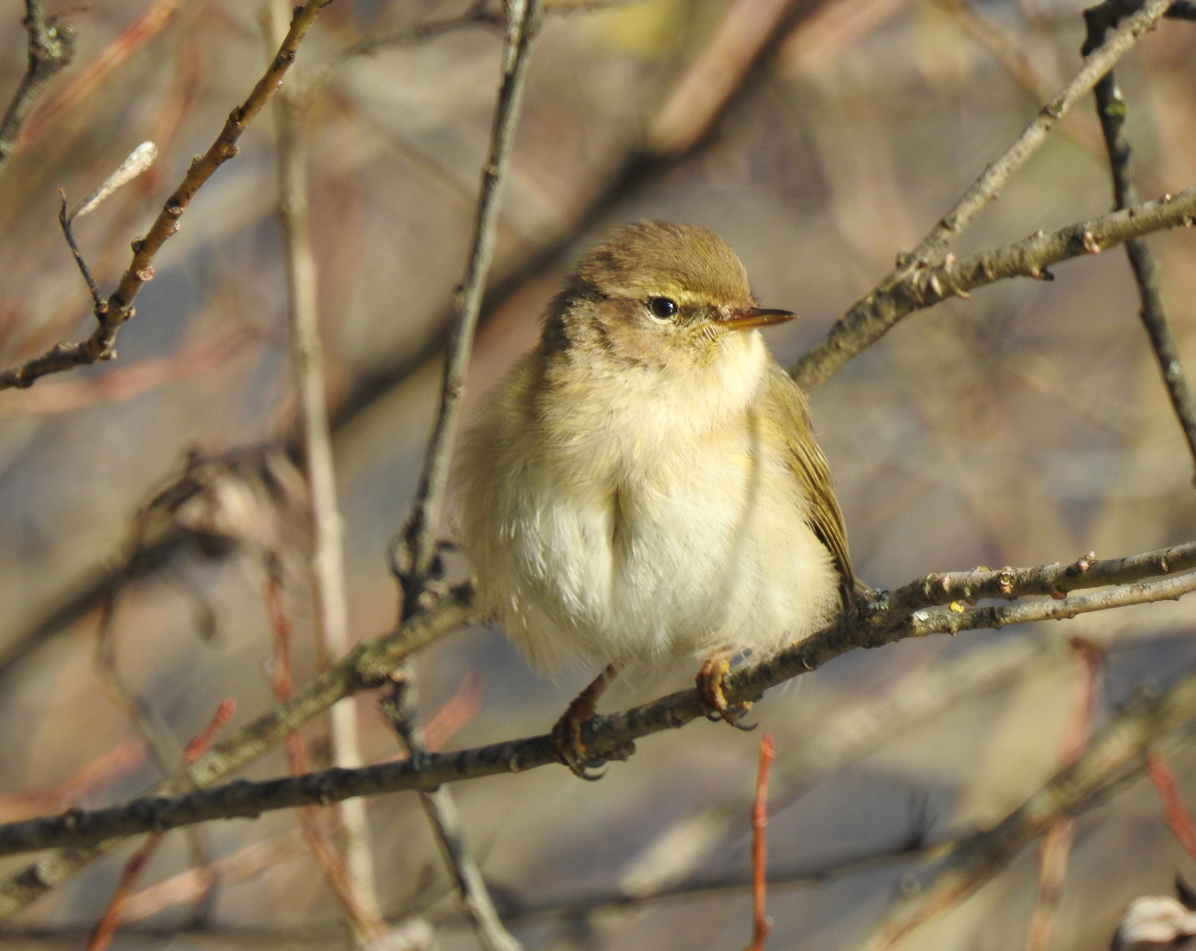 Zilpzalp am Westufer des Zeller Sees, Zell am See, Land Salzburg, Österreich.